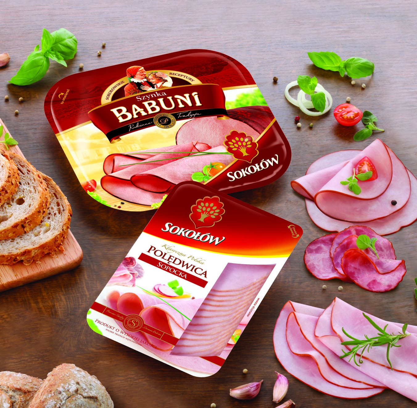 Plastry z szynki firmy Sokołów SA